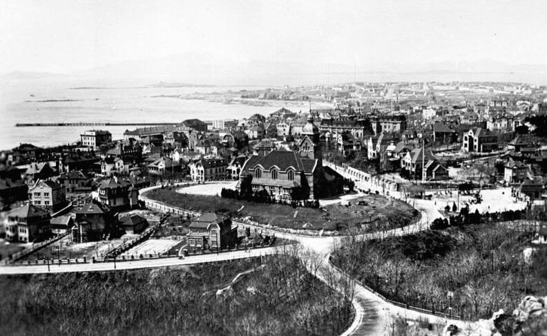 Gesamtansicht von Tsingtau China, Tsingtau.- Gesamtansicht